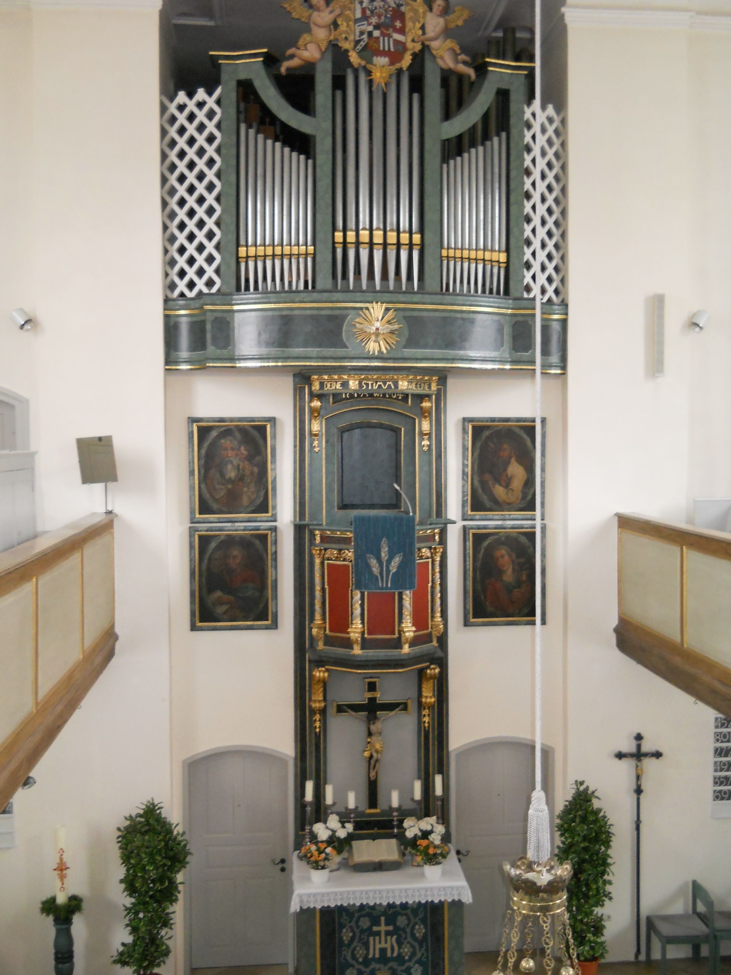 Inneres der Markgrafenkirche Treuchtlingen (Landkreis Weißenburg-Gunzenhausen in Bayern)